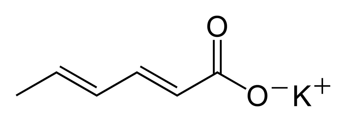 Forma bidimensional do Sorbato de POtássio